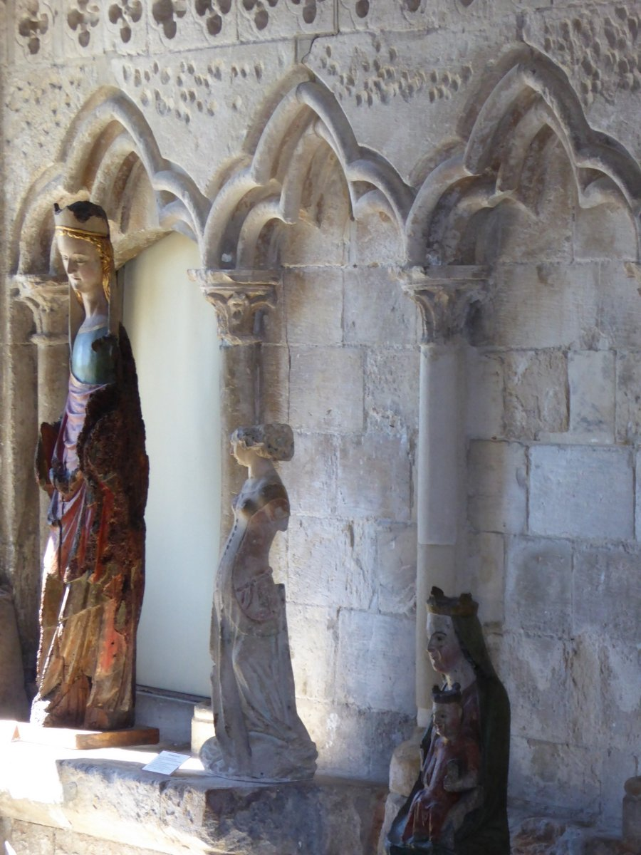 Abbaye de Graville, Arcatures de la salle capitlaire